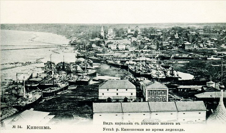 Кинешма. Вид каравана с птичьего полёта в устье реки Кинешемки во время ледохода. Почтовая открытка. Издание В.Грибунина. 1900-е г.г.